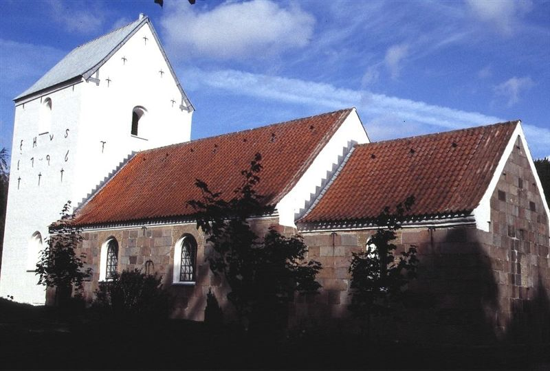 Nørre Kongerslev Kirke i Danmark. Nørre Kongerslev kirke